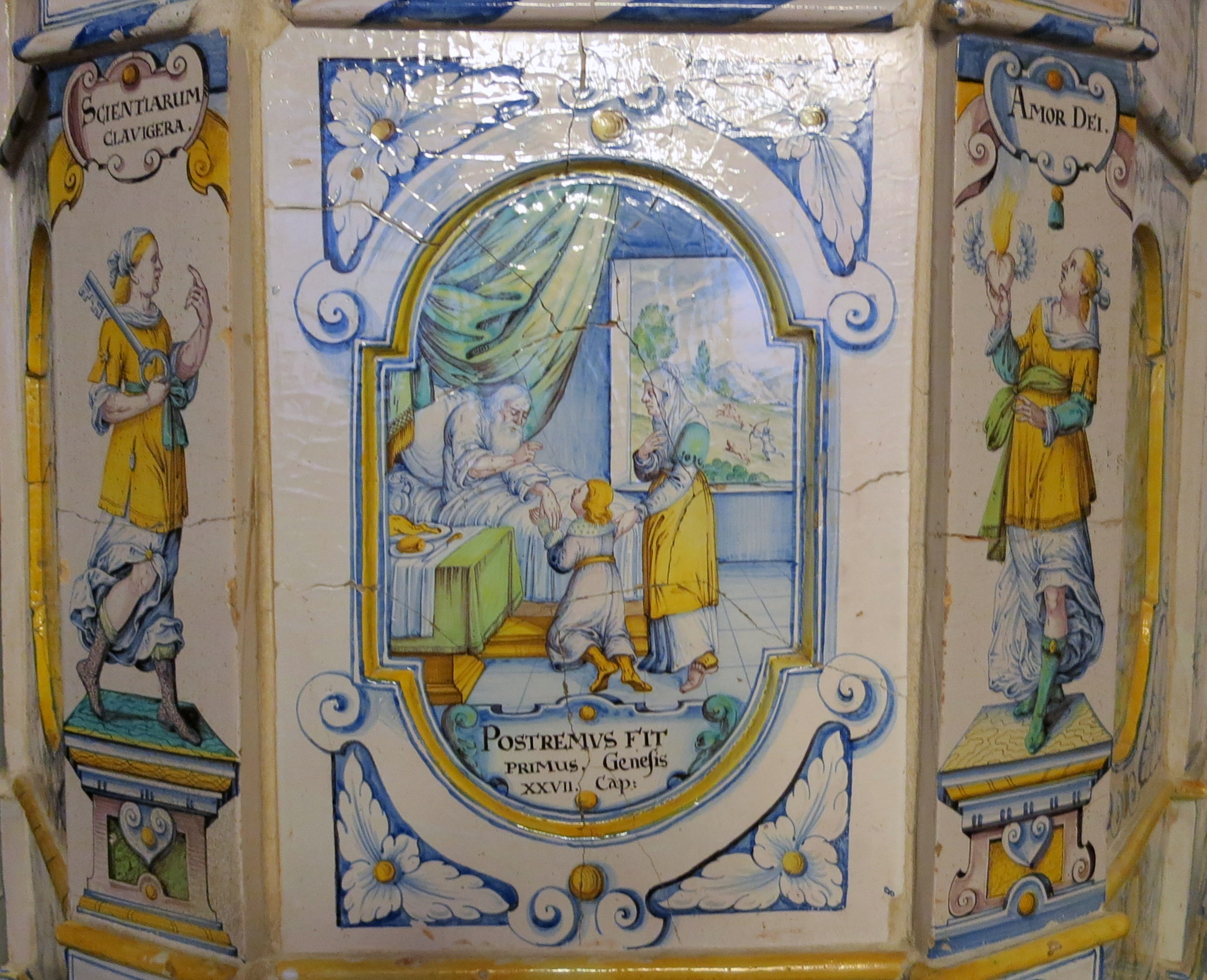 Das Rathaus ist ein altes Patrizierhaus mit einem Fayence-Kachelofen aus Winterthur